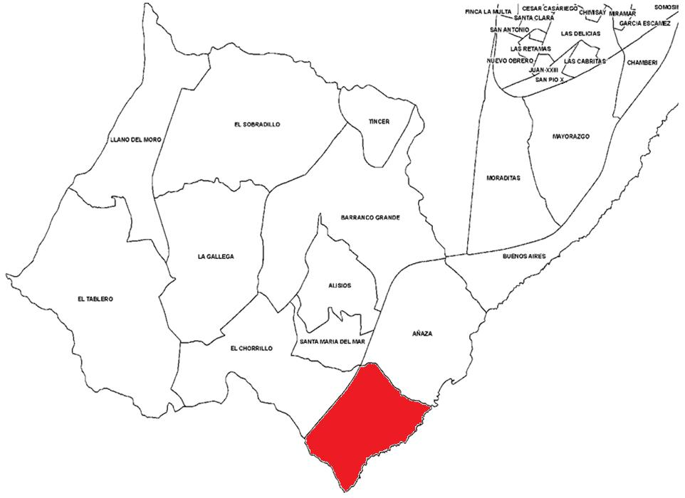 Localización de Acorán en el distrito Suroeste